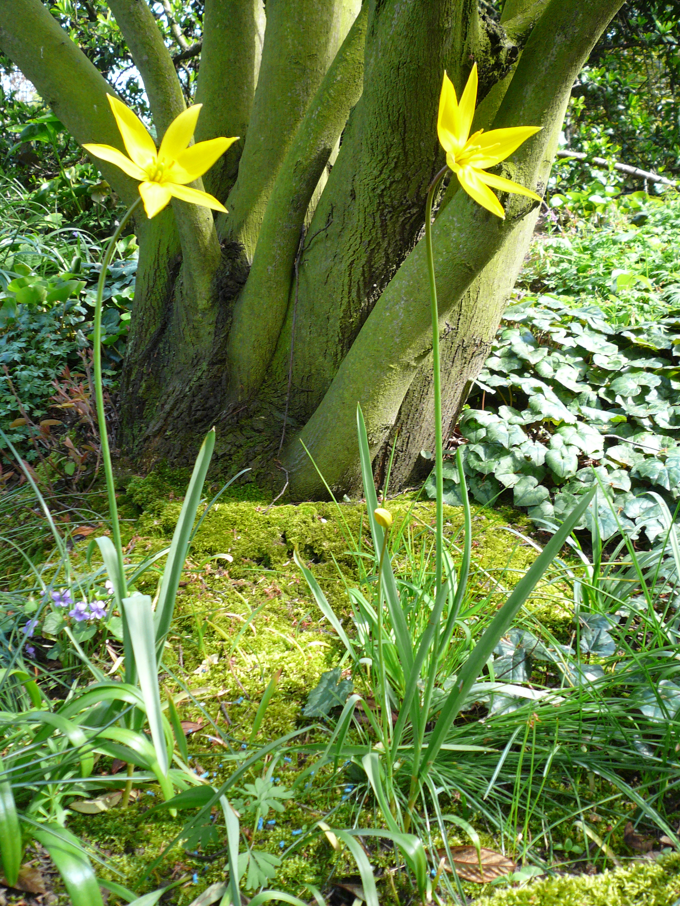 Tulipa sylvestris dans mon jardin